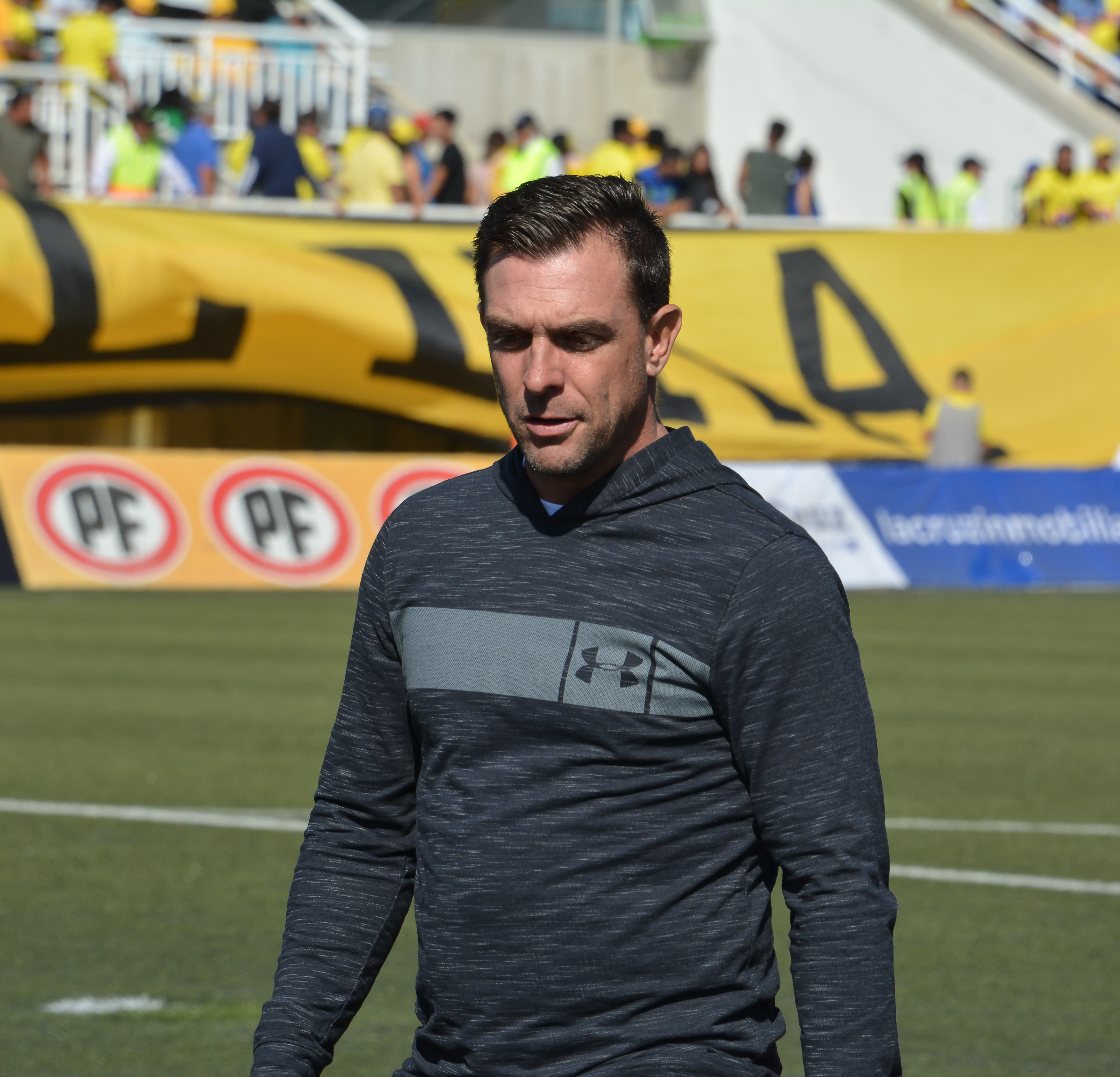 San Luis v Colo-Colo, Estadio Municipal Lucio Fariña Fernández, Quillota, Chile.